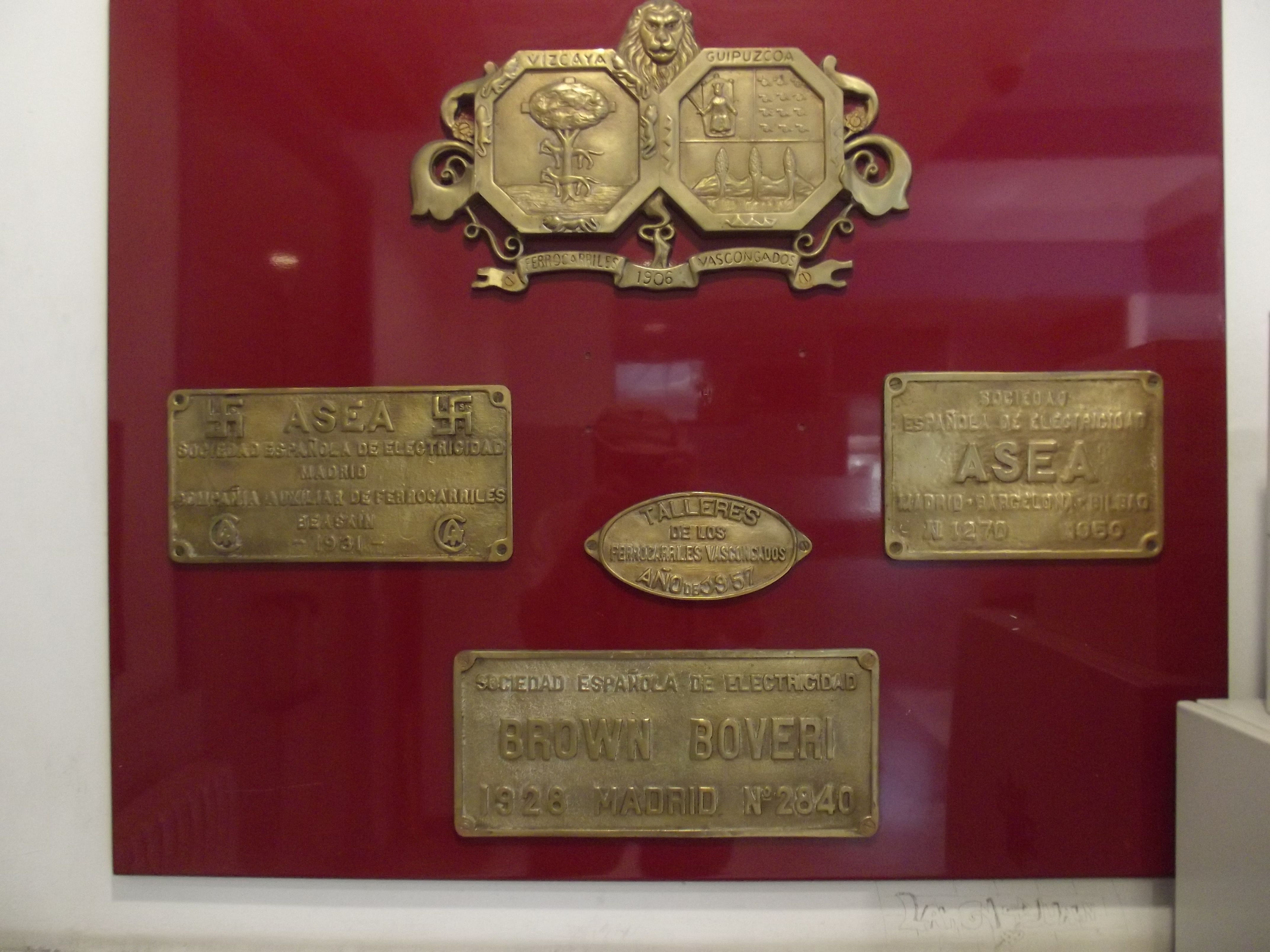 Plaques aan de muur